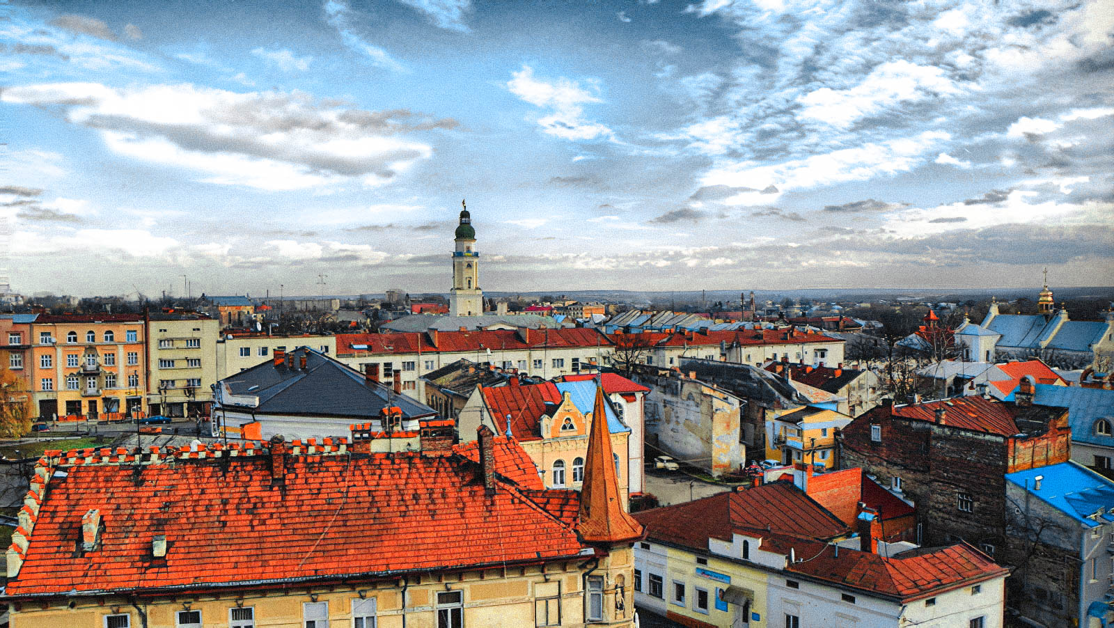 Casco histórico de Drogobych